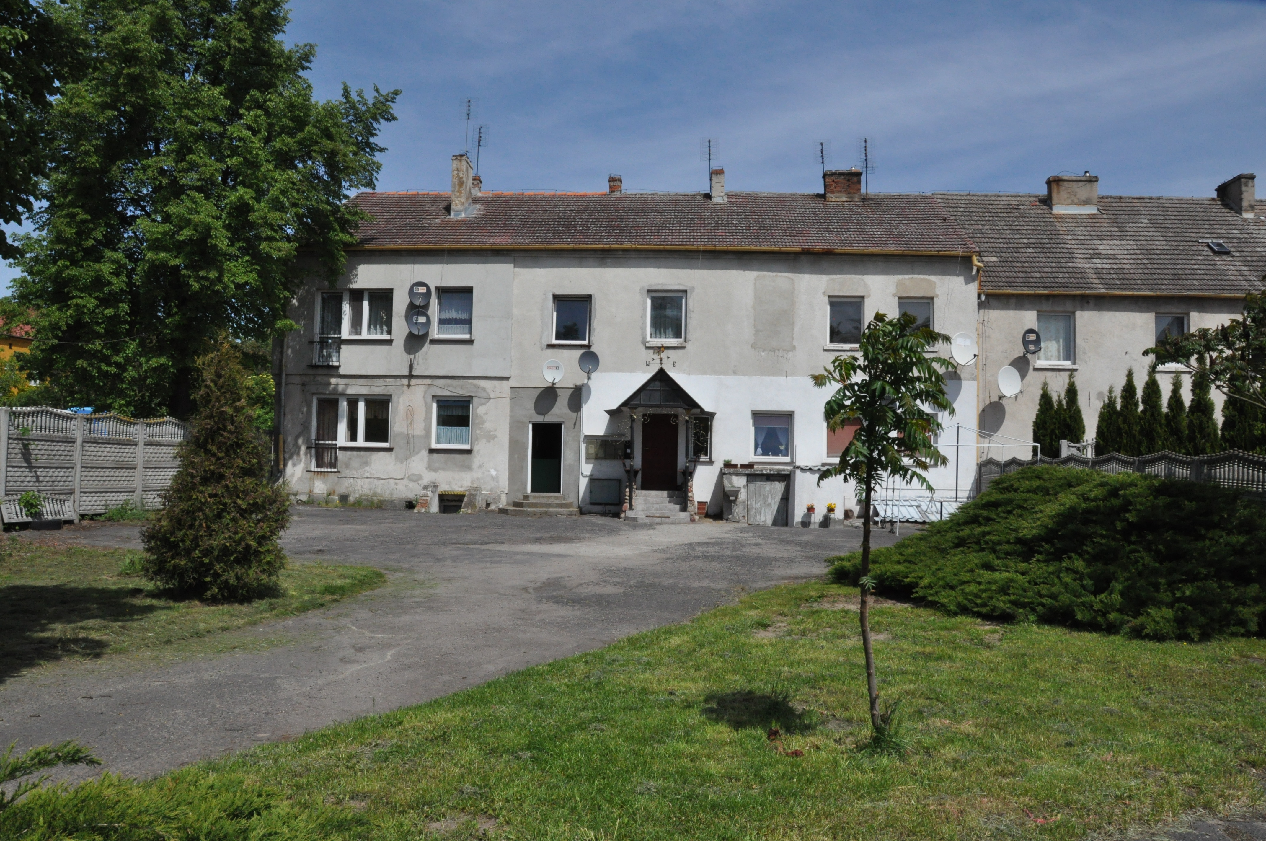 W tym budynku w Widuchowej była strażnica WOP